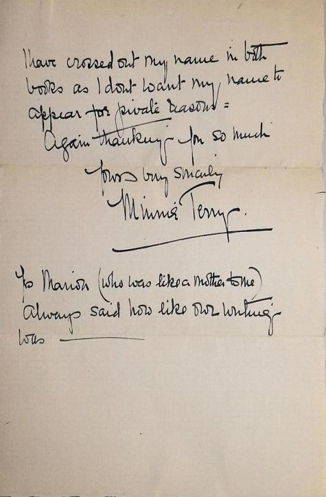 Письмо Минни Терри мистеру Осборну с образцом её подписи, с. 3